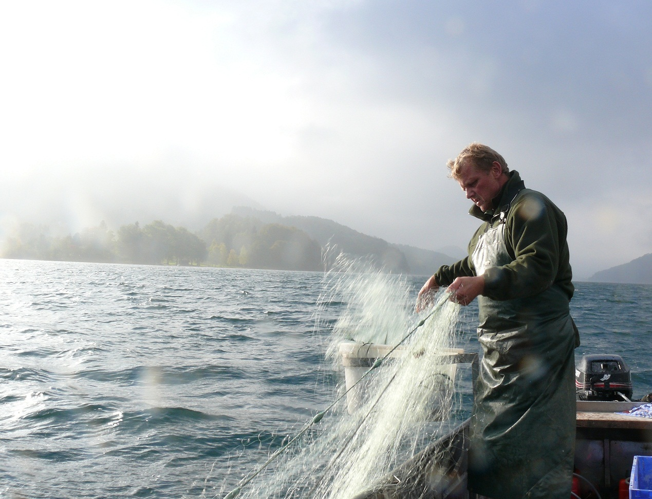 Schloss Fuschl Fischerei